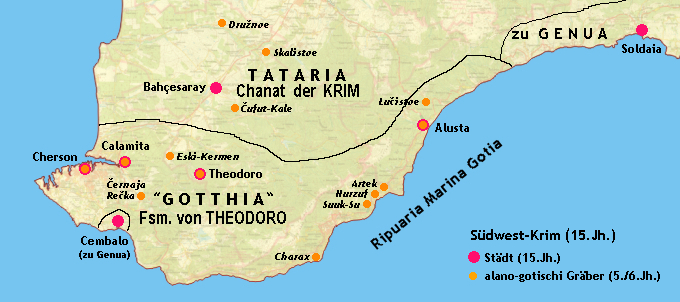 d Krimgote im 15.Jh.; Charte nochem: Aleksandr A. Vasiliev: "The Goths in the Crimea". Cambridge, MA: The Mediaeval Academy of America, 1936